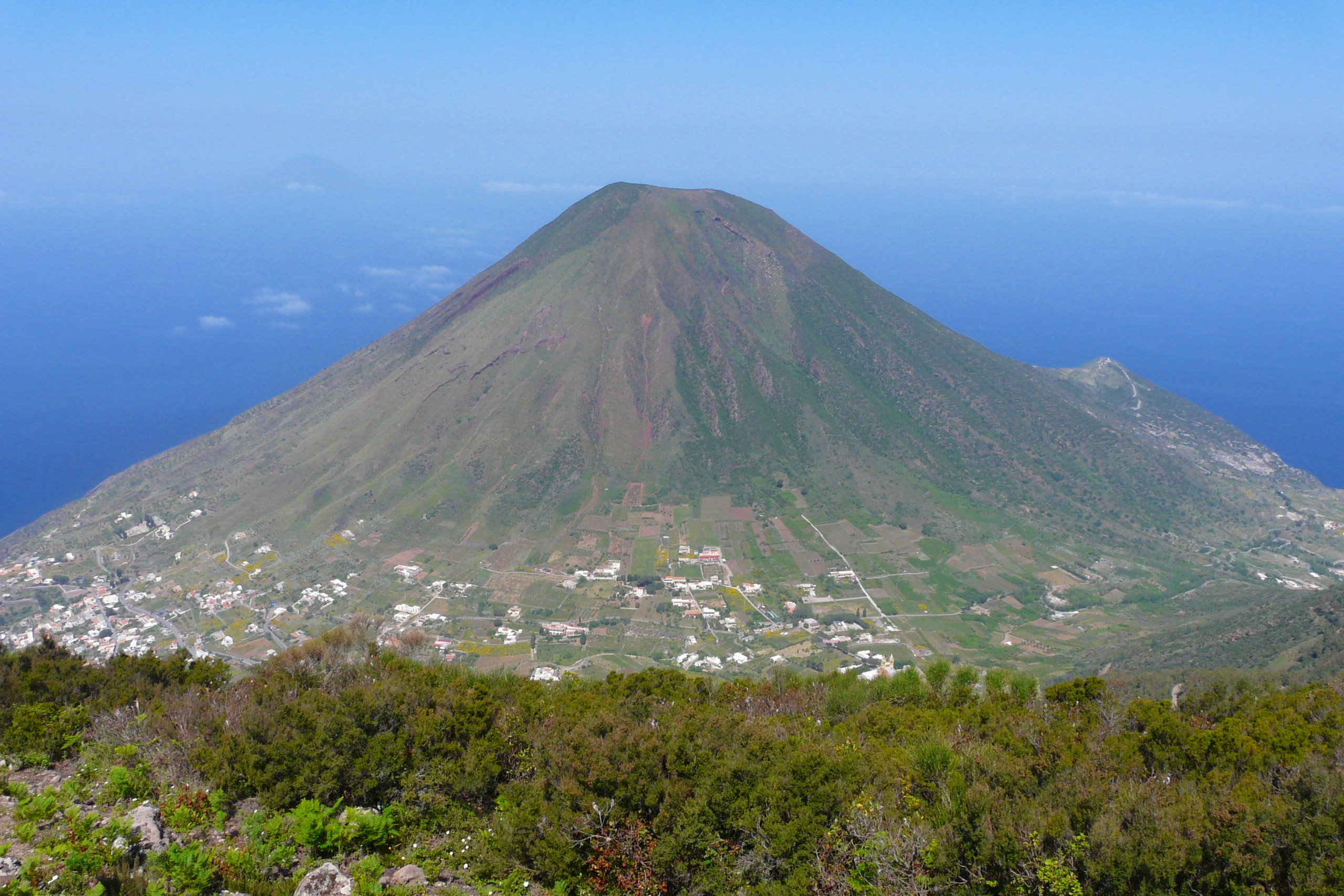 Description Monte dei Porri, Salina (îles éoliennes, Sicile) DateMay 2009SourceOwn workAuthorBRUNNER Emmanuel, Manu25 Monte dei Porri, Salina (îles éoliennes, Sicile)